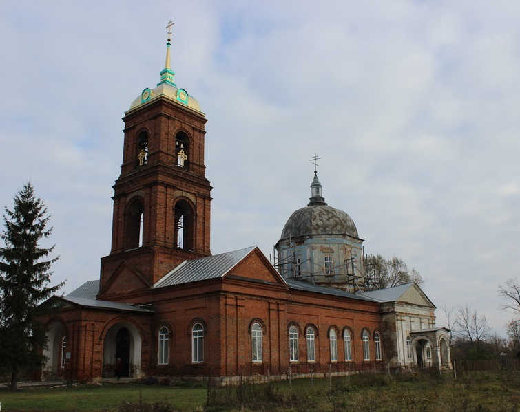 Свято-Троицкий Храм вид спереди